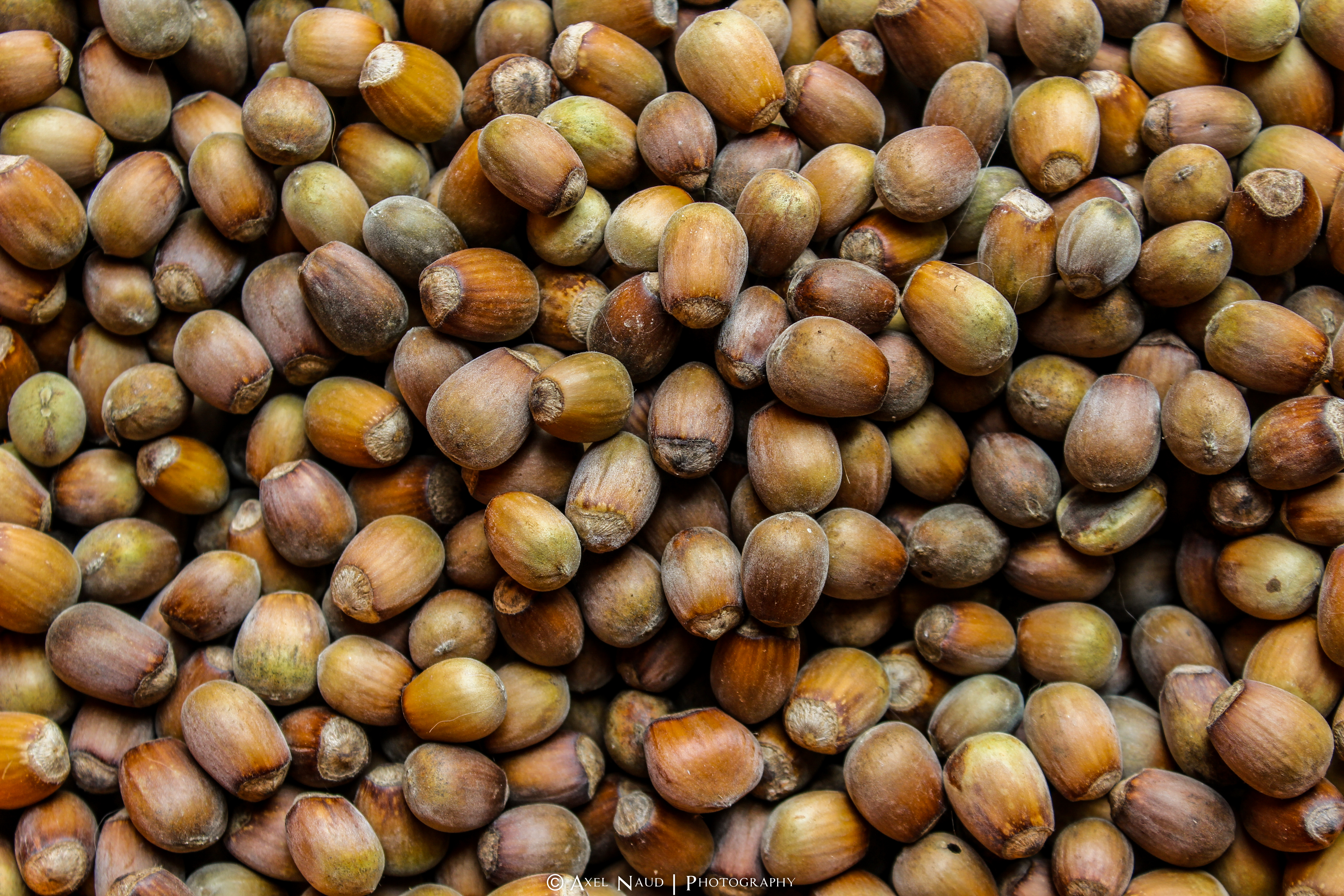 fruit